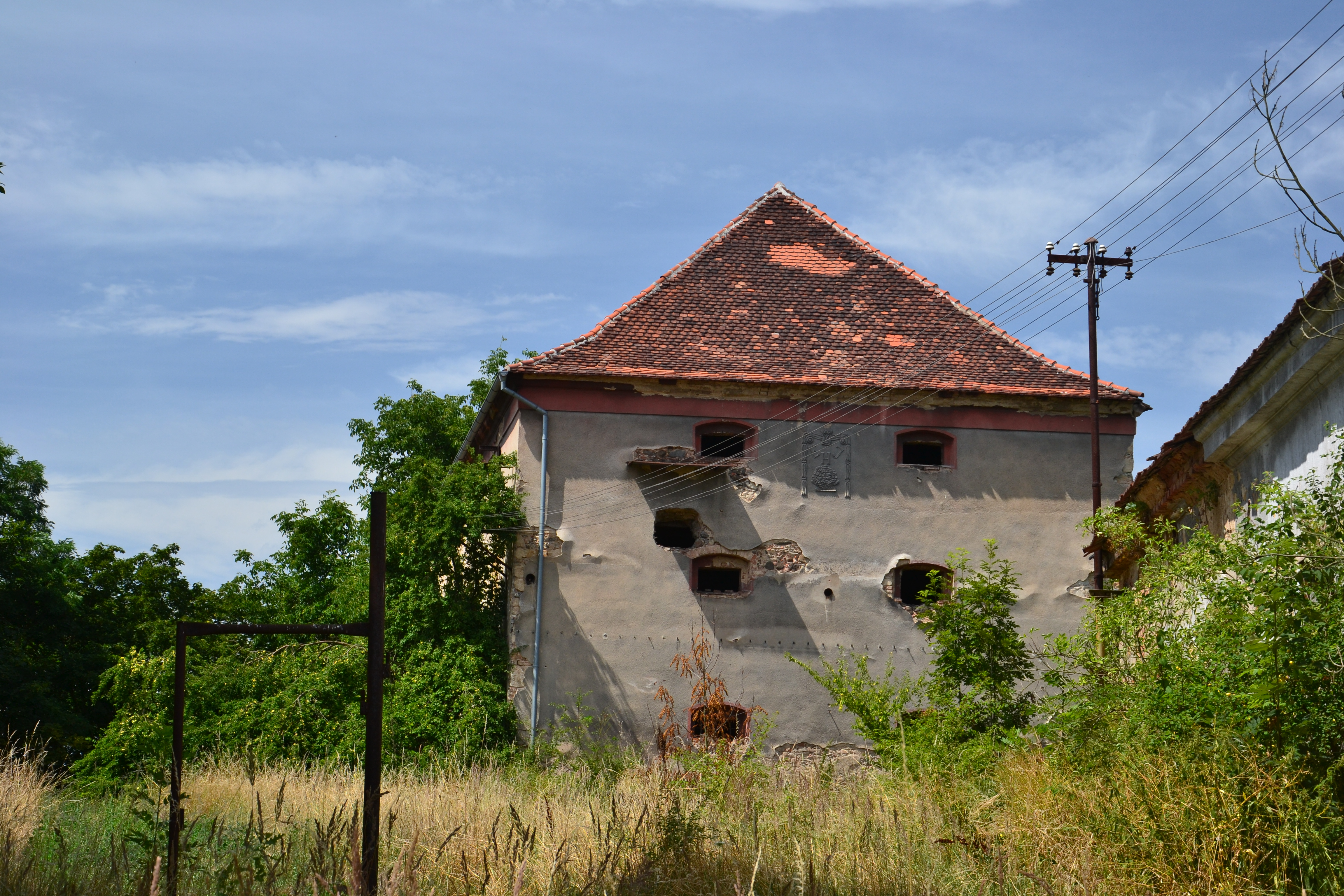 Hospodářská budova ve dvoře tvrze